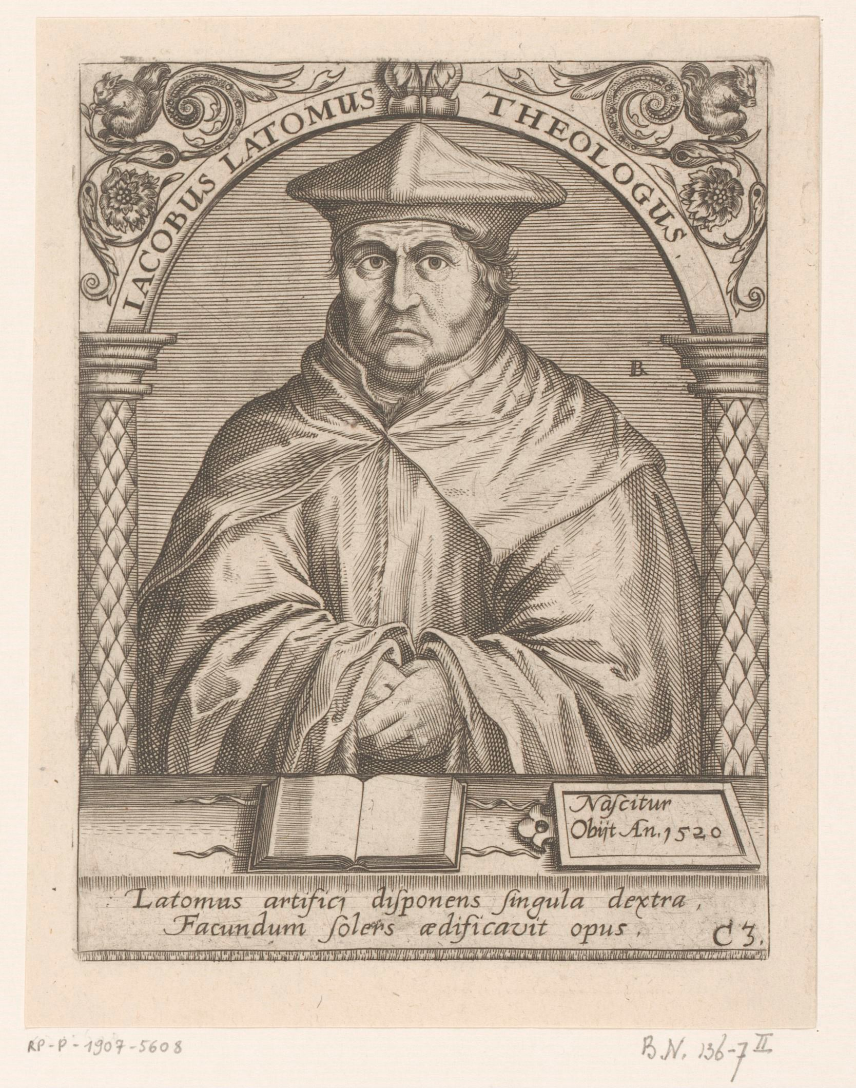 IdentificatieTitel(s): Portret van Jacobus LatomusJacobus Latomus theologus. (titel op object)Serie portretten van vijftiende- en zestiende-eeuwse geleerden (serietitel)Objecttype: prent Objectnummer: RP-P-1907-5608Opschriften / Merken: verzamelaarsmerk, verso, gestempeld: Lugt 2228Omschrijving: Rechtsonder genummerd C3.VervaardigingVervaardiger: prentmaker: Robert Boissard (vermeld op object)Plaats vervaardiging: FrankrijkDatering: 1597 - 1599Materiaal: papier Techniek: graveren (drukprocedé)Afmetingen: plaatrand: h 140 mm (Onduidelijke plaatrand.) × b 107 mm (Onduidelijke plaatrand.)ToelichtingMogelijk prent uit: Boissard, Jean-Jacques; Bry, Theodoor de; e.a. Bibliotheca sive thesaurus virtutis et gloriae in quo continentur illustrium eruditione et doctrina virorum effigies et vitae (...). Frankfurt: Guilielmi Fitzeri, 1628.OnderwerpWat: historical personsbookrodents: squirrel - FF fabulous animals (sometimes wrongly called 'grotesques'); 'Mostri' (Ripa)Wie: Jacobus LatomusVerwerving en rechtenVerwerving: onbekend 2006Copyright: Publiek domein